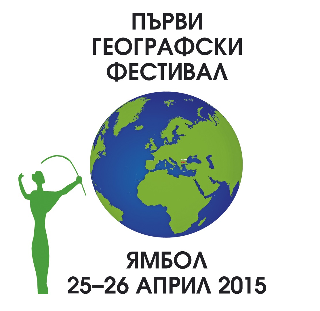 Лого на Първия географски фестивал - Ямбол 2015